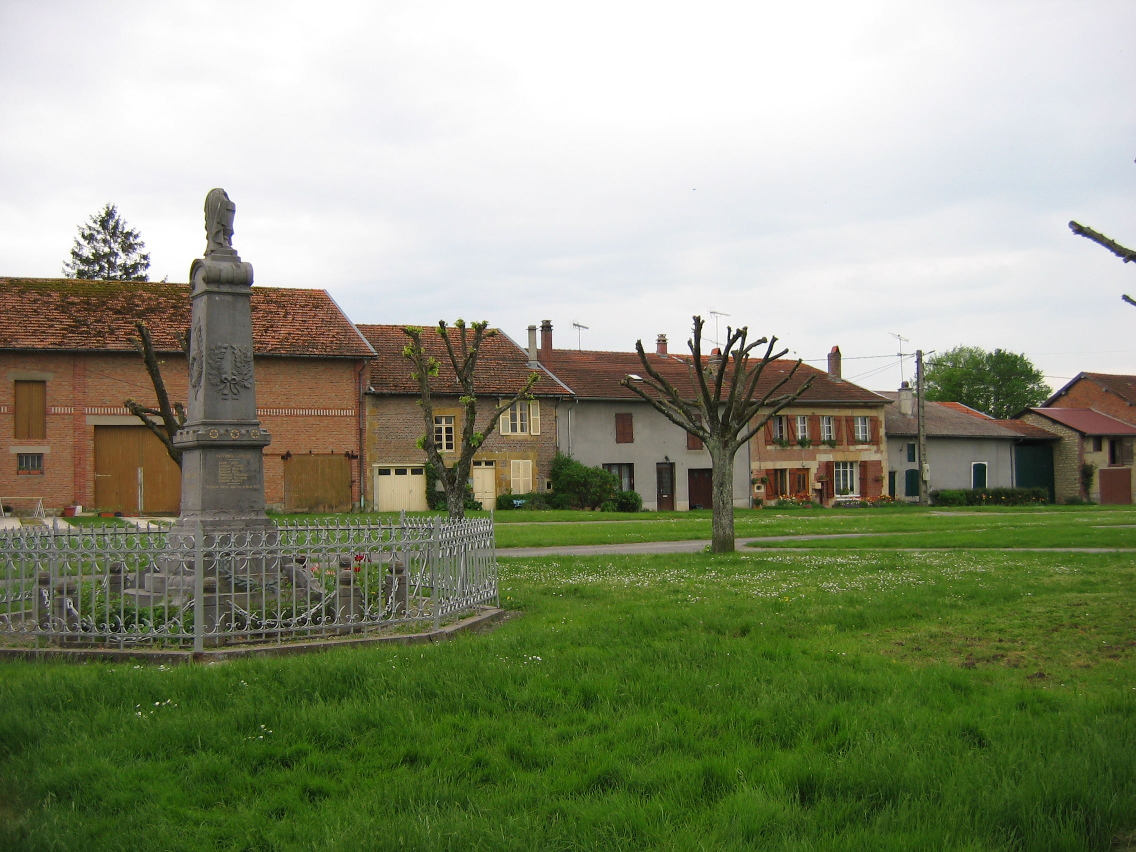 monument aux morts et place de Marcq en Ardennes